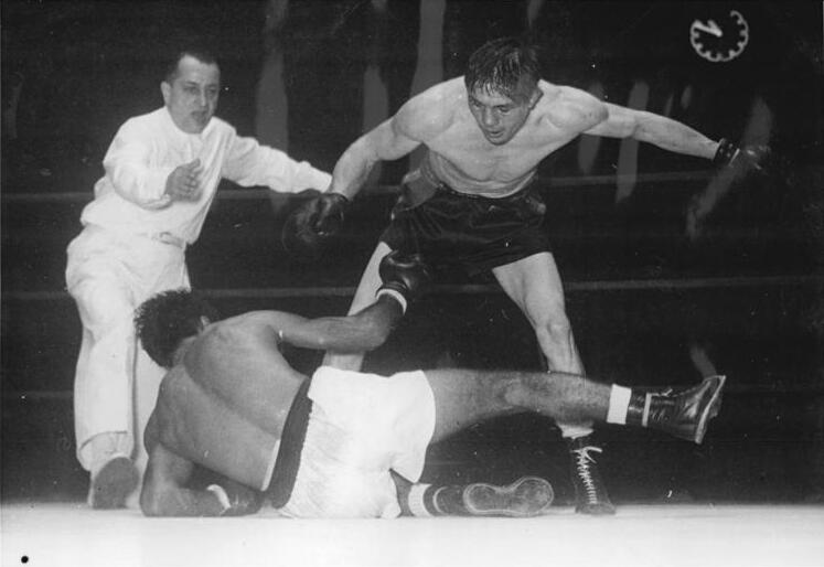 Padilla, Ray Famechon Illus XIV 24.12.51 Frankreich. Boxkampf Ray Famechon gegen Padilla (am Boden) (18.12.51)